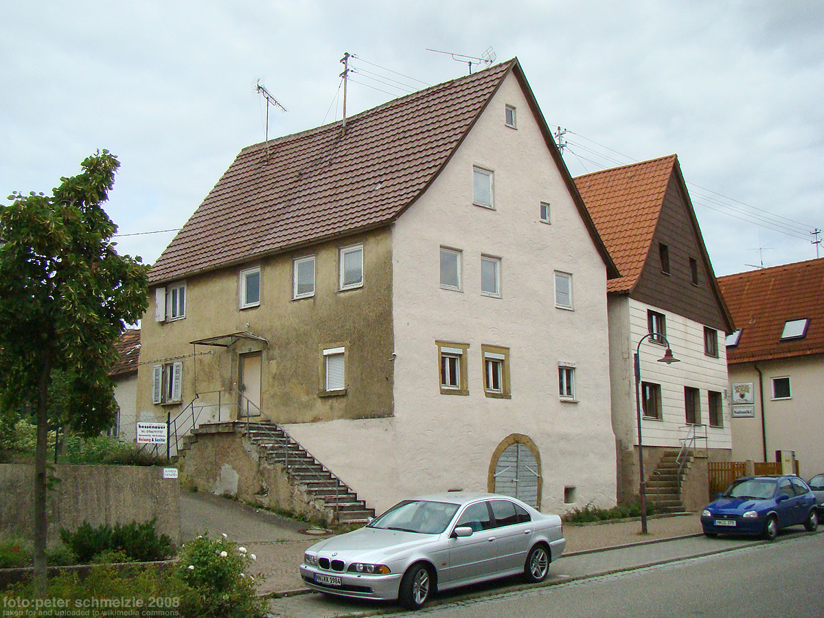 Handwerkerhaus Deutschritterstraße 9 in Heilbronn-Kirchhausen